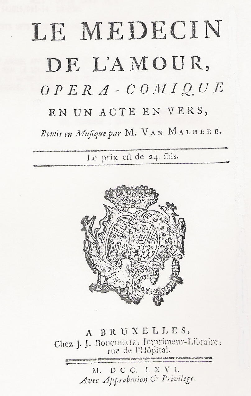 Pierre Van Maldere, opéra Le Médecin de l'amour, Bruxelles, 1766. Page de titre.